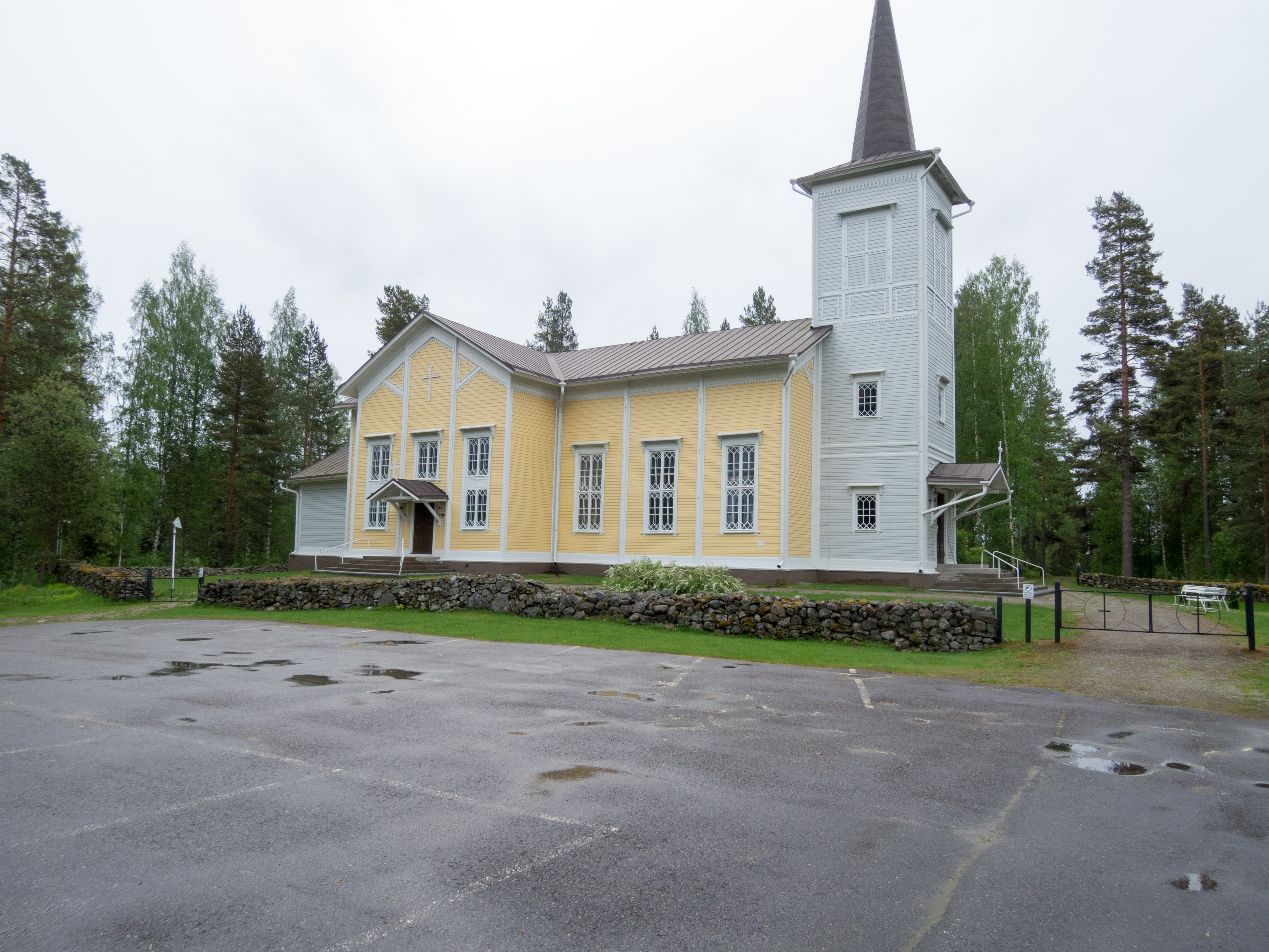 Savonrannan kirkko